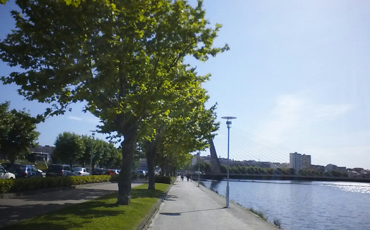 Paseo del Lérez y puente de los Tirantes en Pontevedra capital